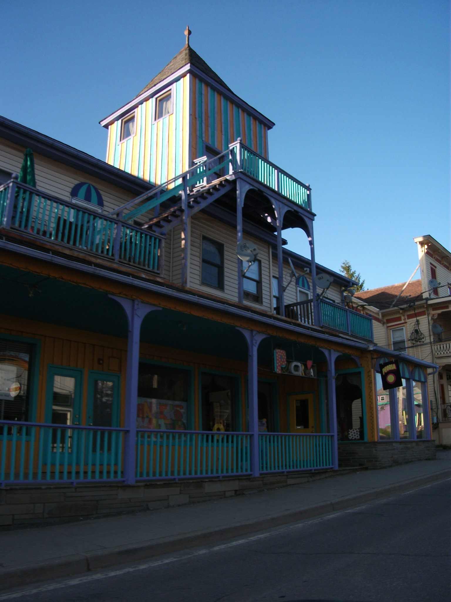 Tannersville, New York